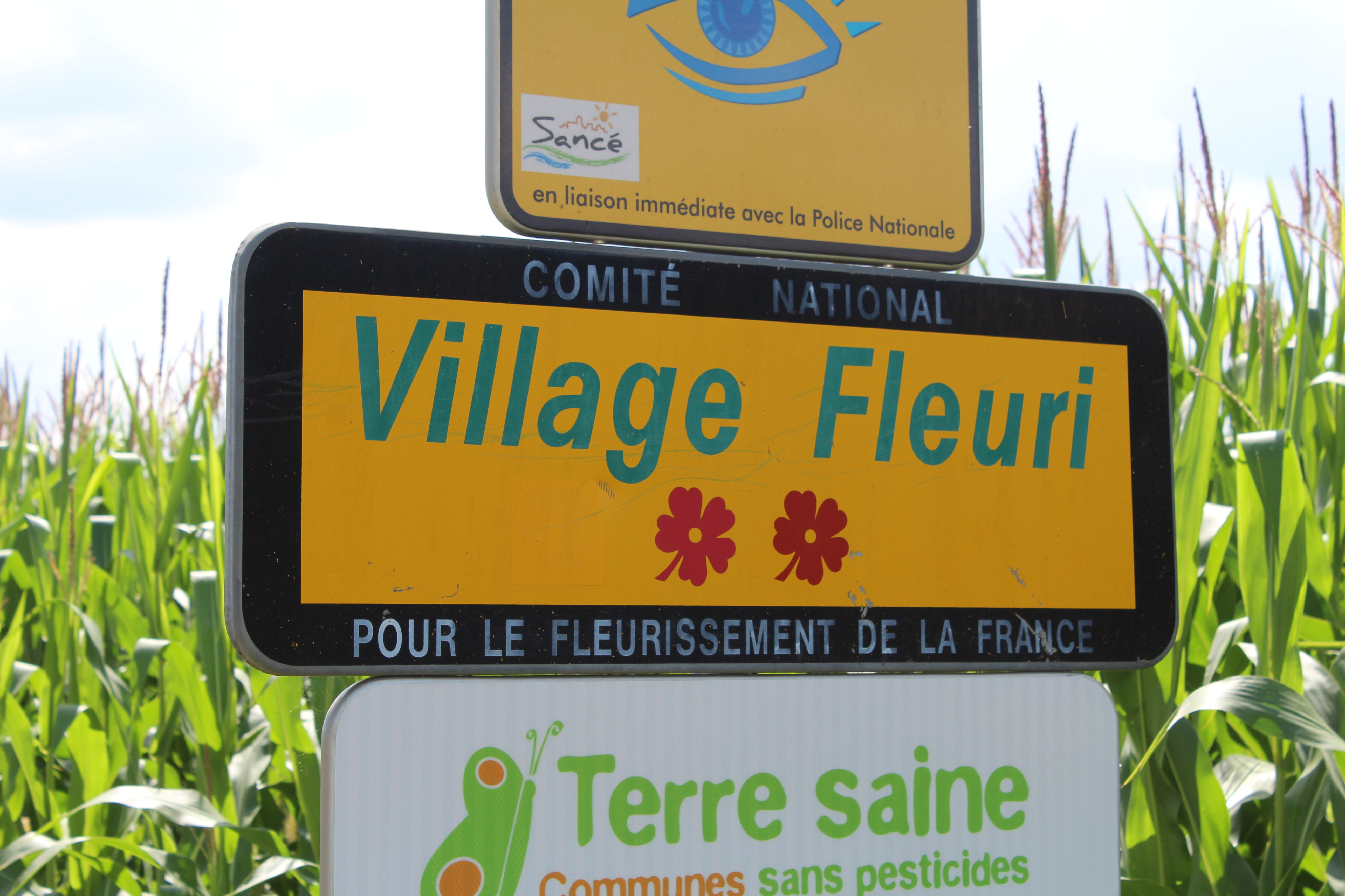 Panneau village fleuri à Sancé.